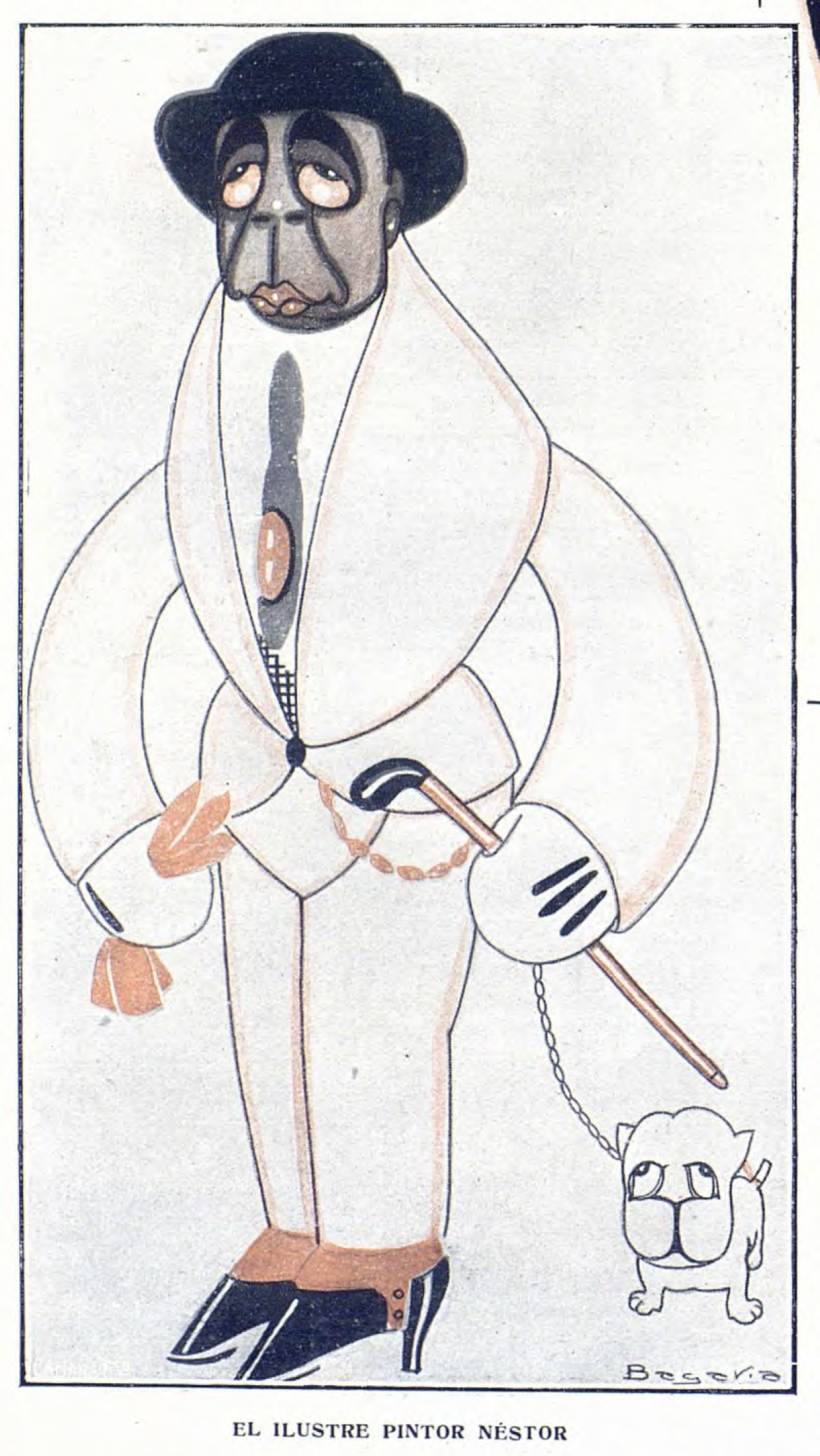 El ilustre pintor Néstor.